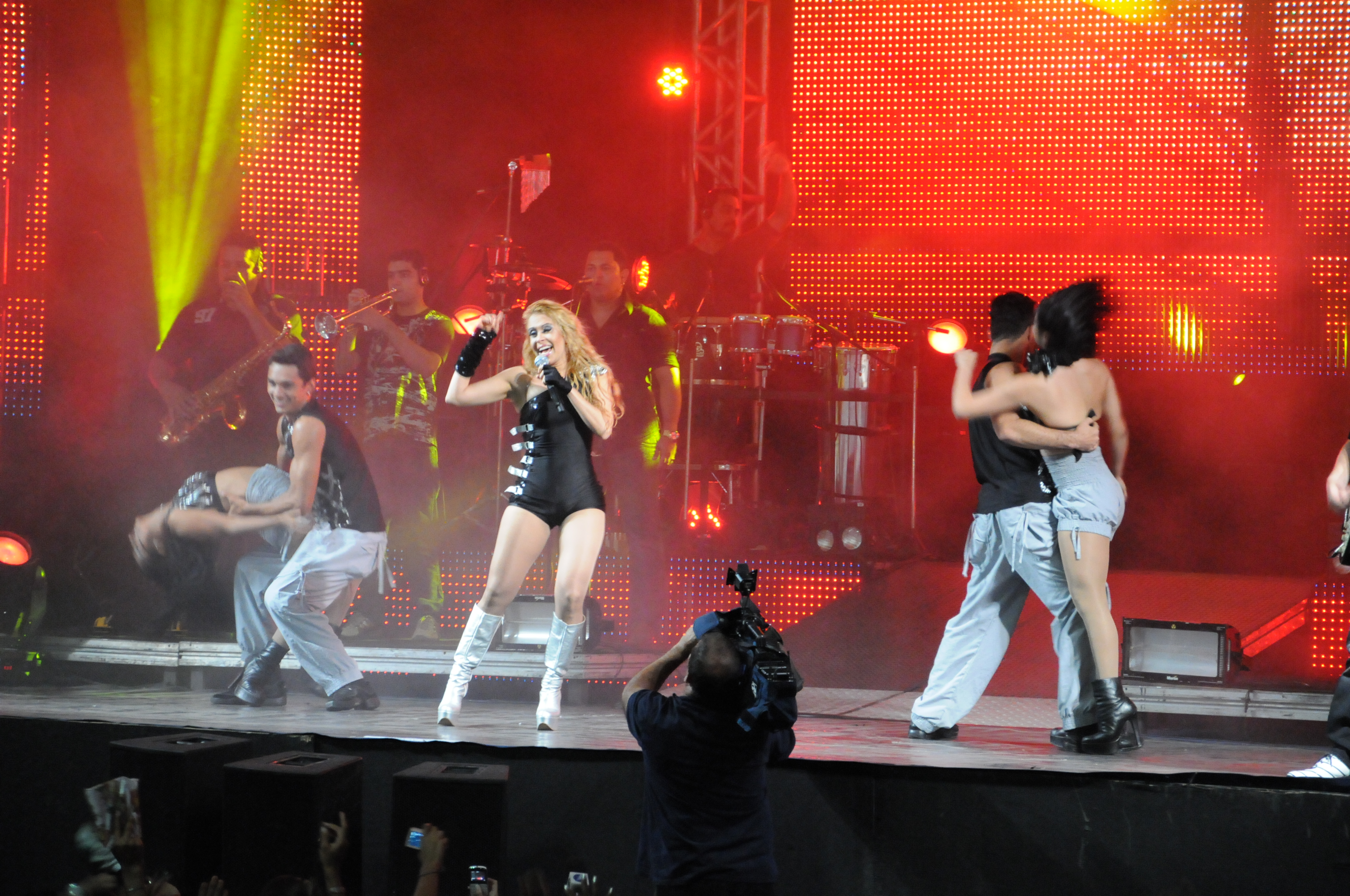 Show da Emancipação com a Banda Calypso.